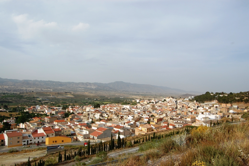 Vista de Tíjola desde el oeste